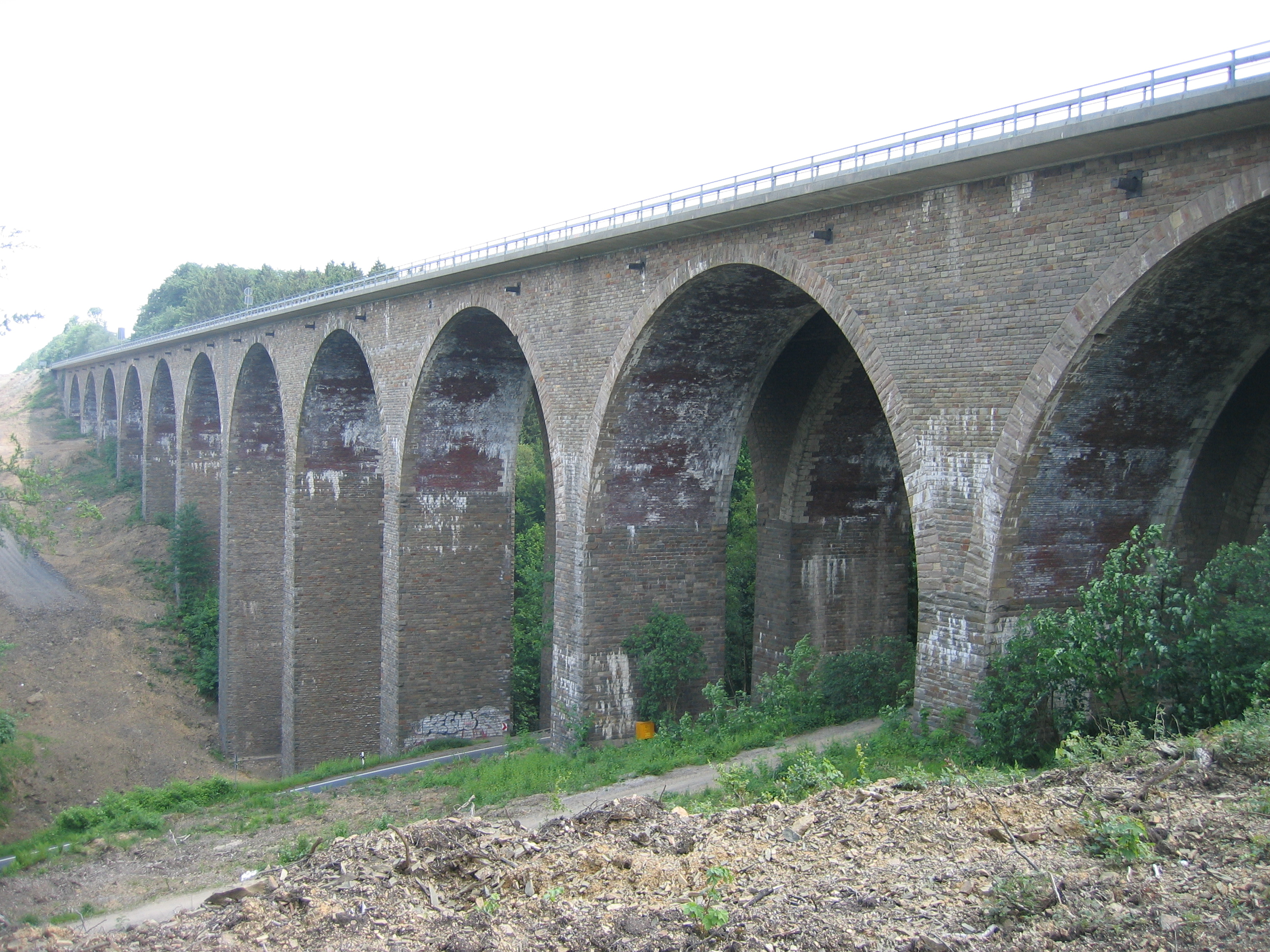 Autobahn-Viadukt bei Preyersmühle, Wermelskirchen